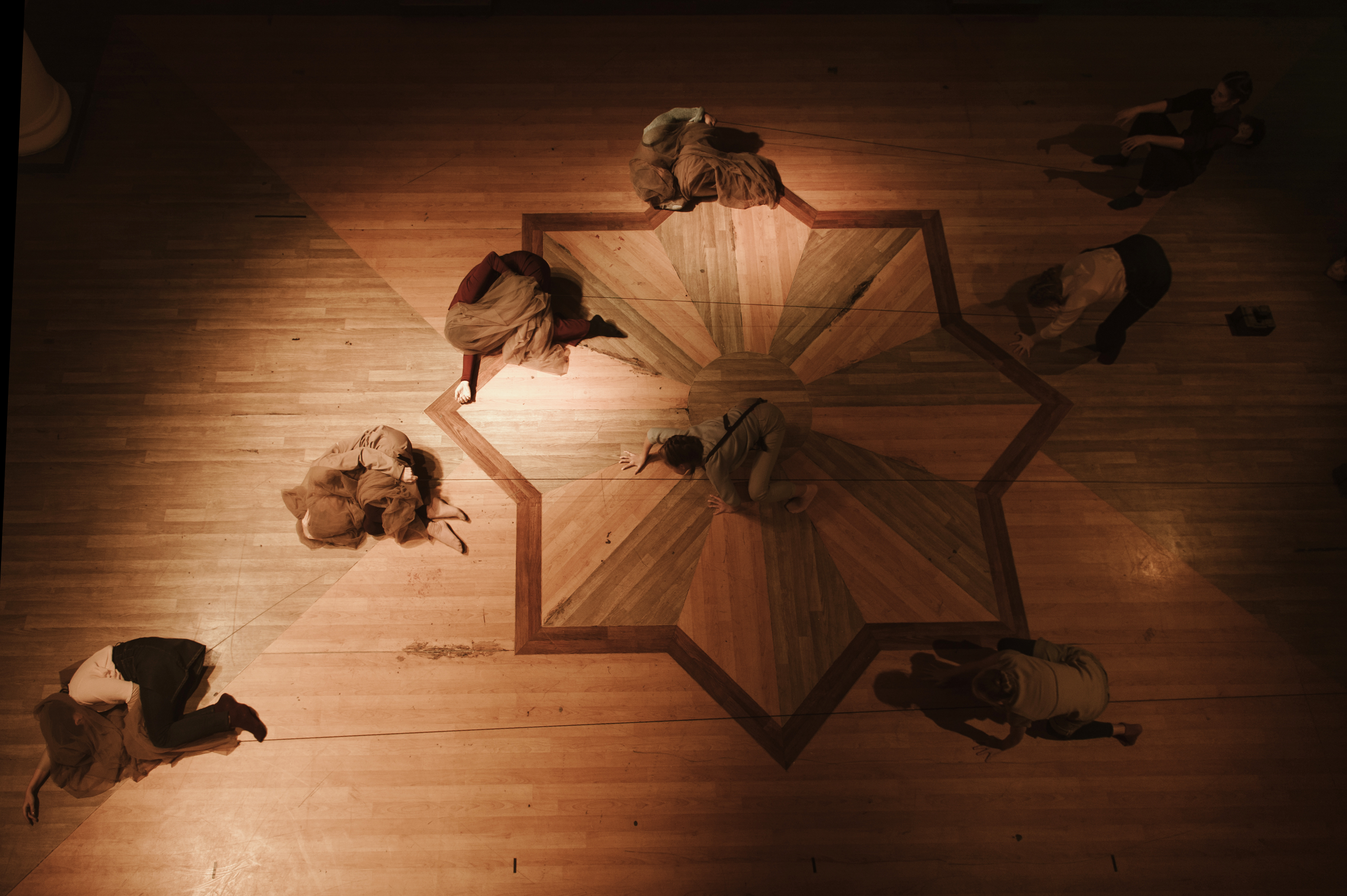 Фрагмент перформанса